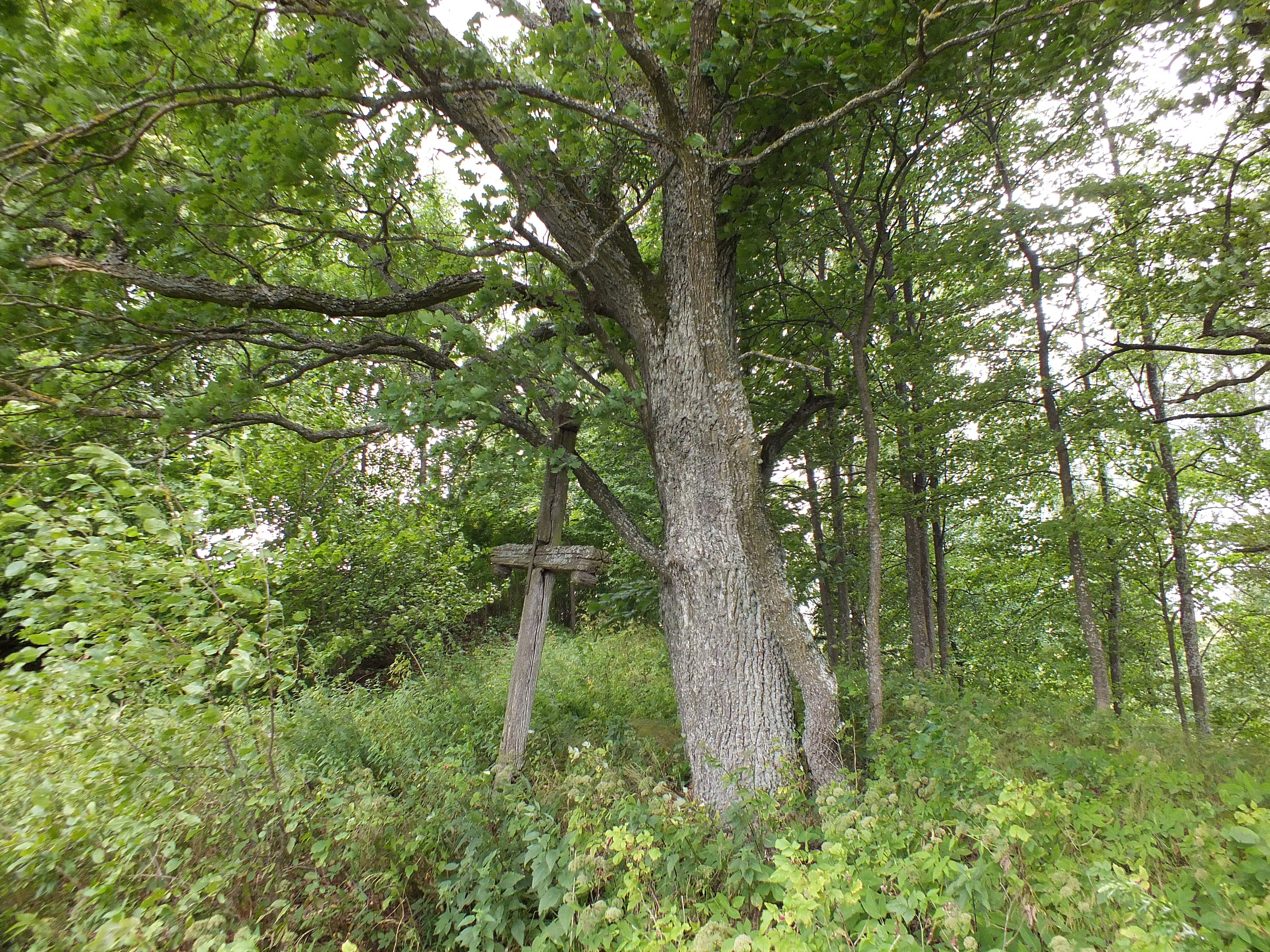 Senas kryžius ant Bartkūnų piliakalnio